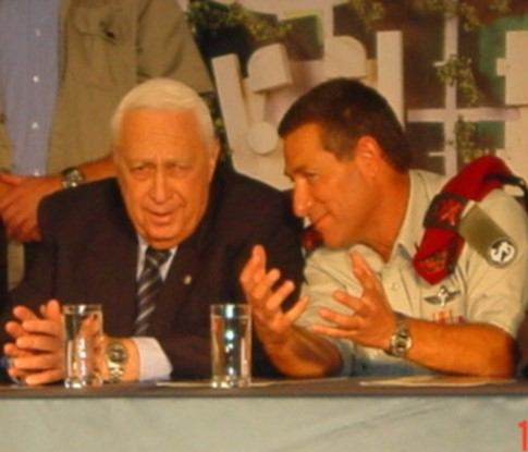 טקס הנחת אבן פינה